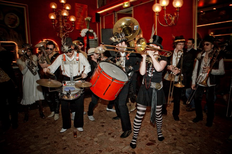 Fanfare Talku des Beaux-Arts au Cirque d'Hiver en 2012.